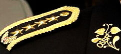 Vojenská rovnošata - detail. Generálska slávnostná uniforma. Náplecník s vojenskou hodnosťou generál. Lipová ratolesť pre všetky generálske hodnosti umiestnená na golieri vojenskej blúzy. Ozbrojené sily Slovenská republika.